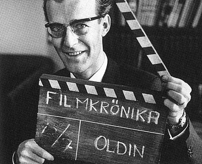 Gunnar Oldin